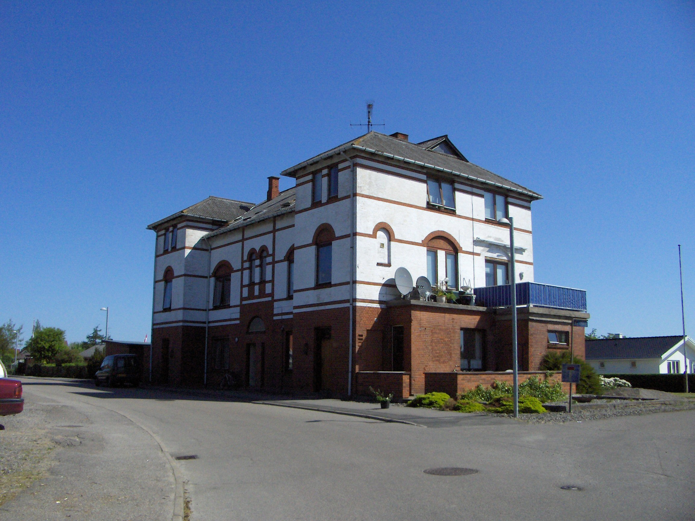 Kalvehave Station